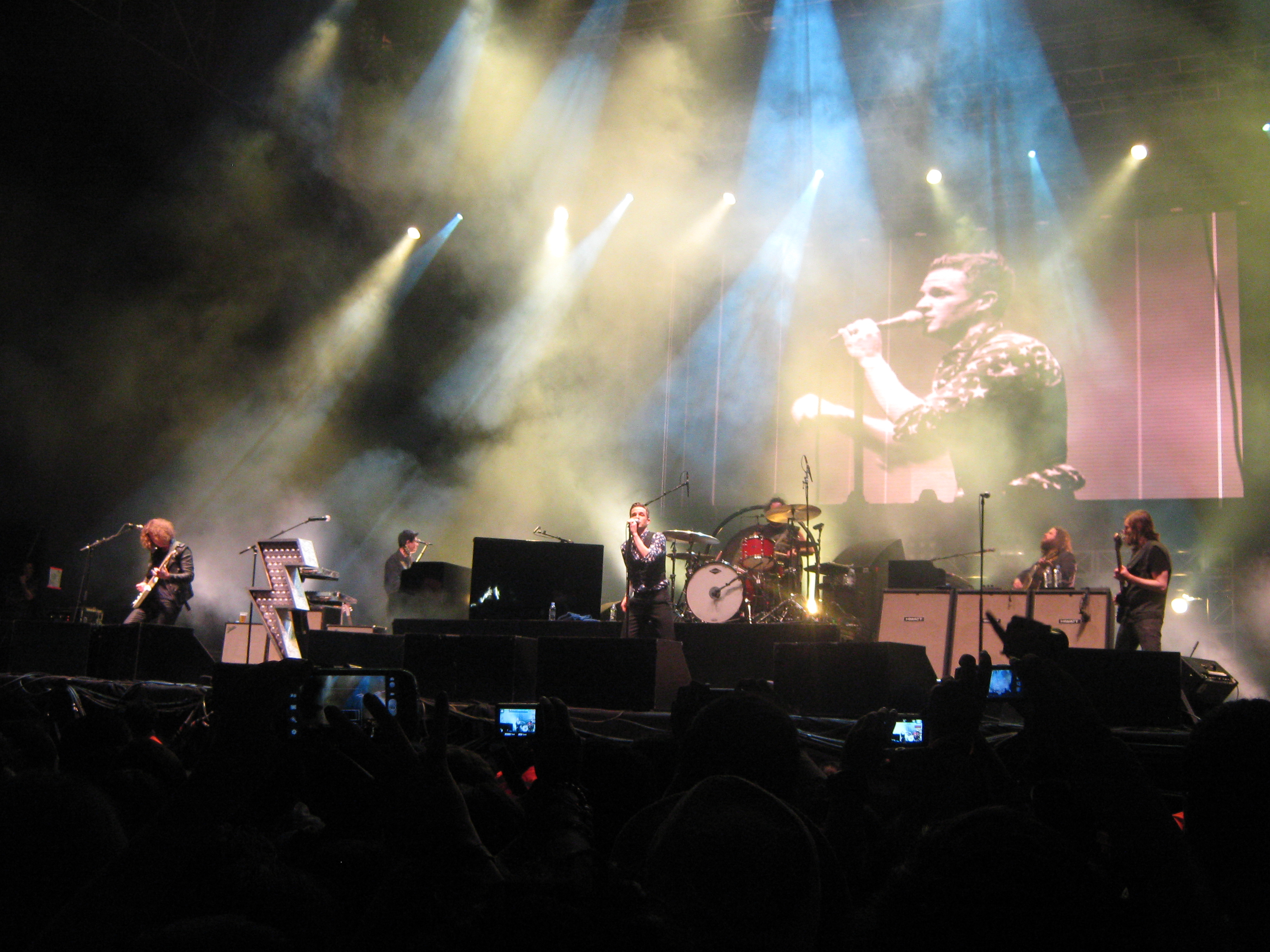 The Killers en el Estéreo Picnic Bogotá 2013